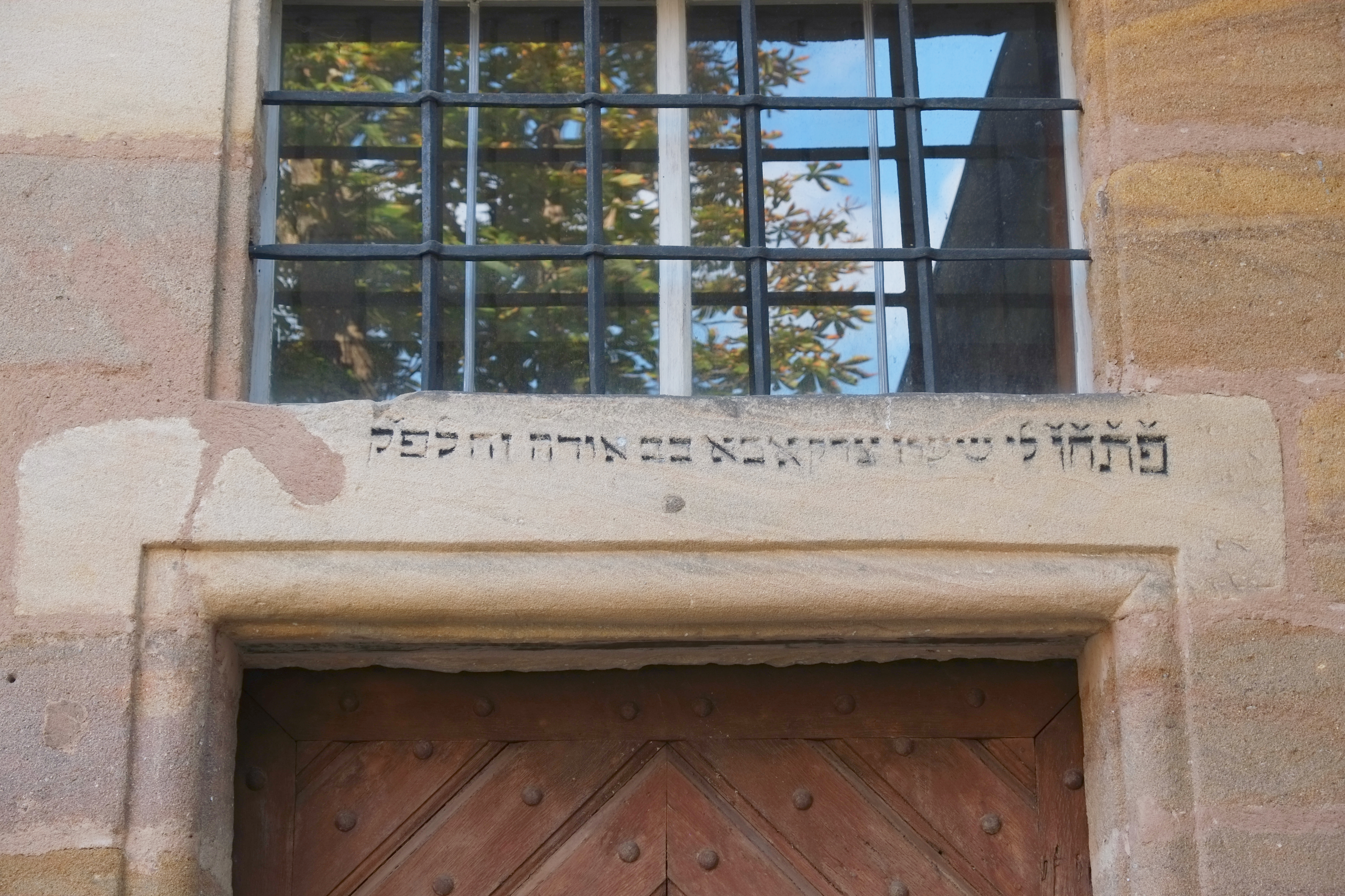 Synagoge in Georgensgmünd im Landkreis Roth (Bayern/Deutschland)